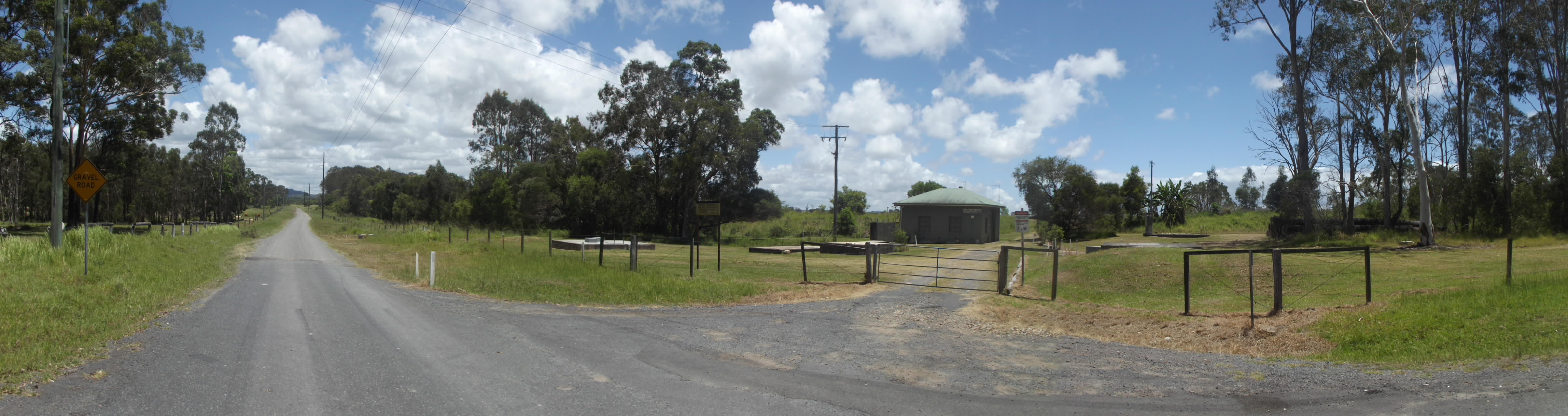 Meridan Plains QLD 4551, Australia